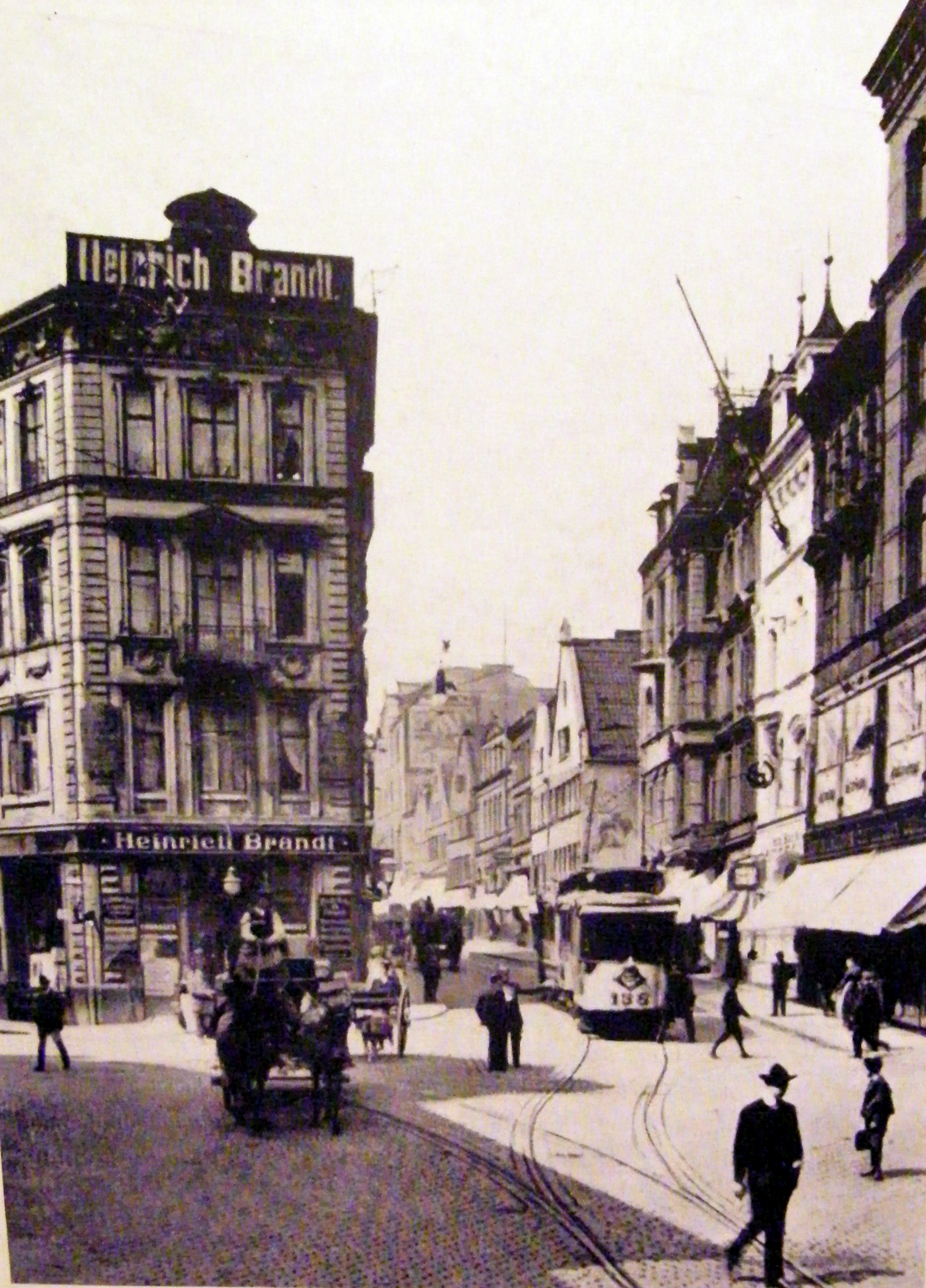 Altona-Altstadt (Große Bergstraße aus Richtung Nobistor)